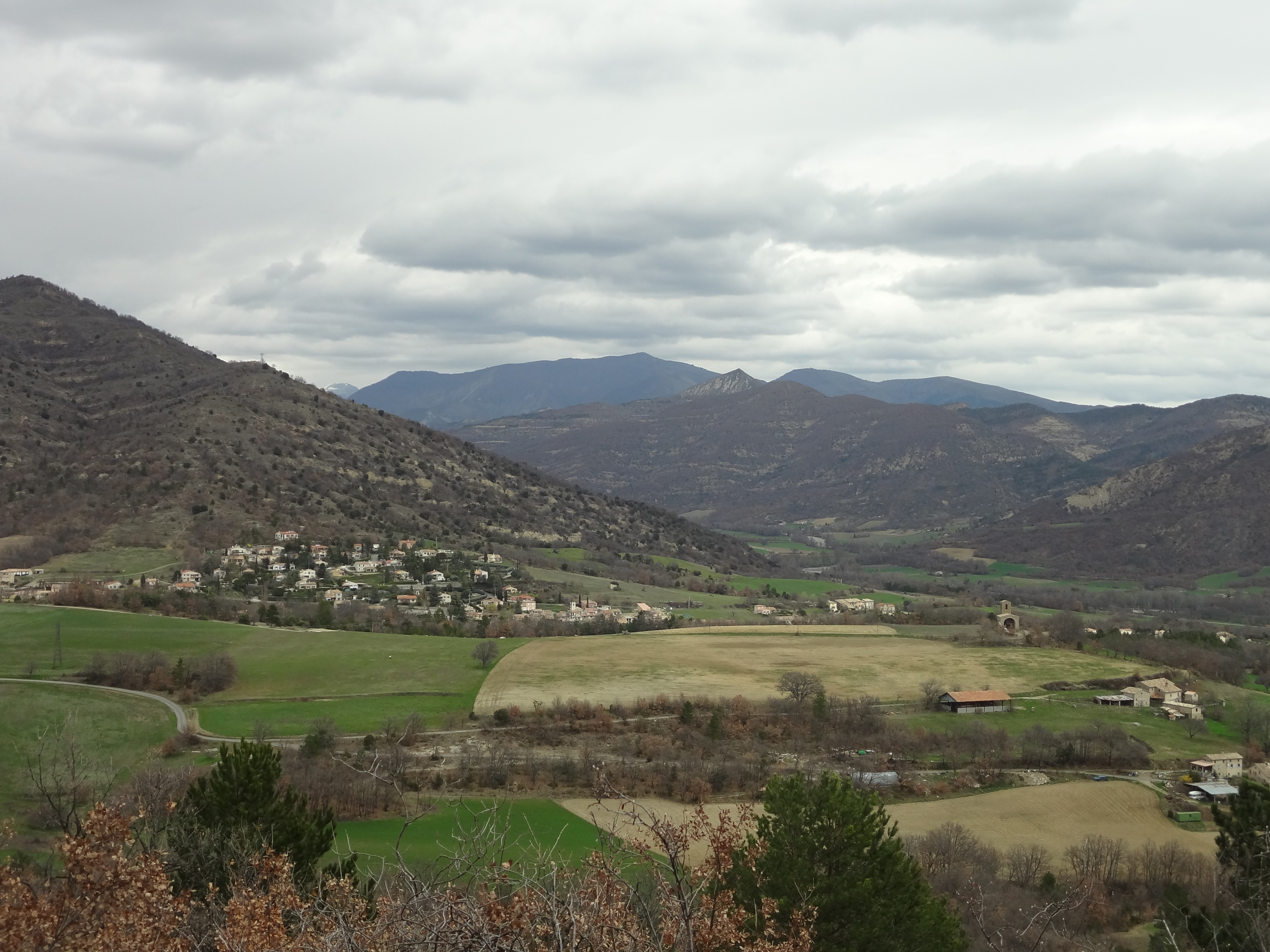 Vallée de Mirabeau et sommet du Ruth (1299 m) au centre, le Piégu (1010 m) à gauche, de la colline Saint-Philippe